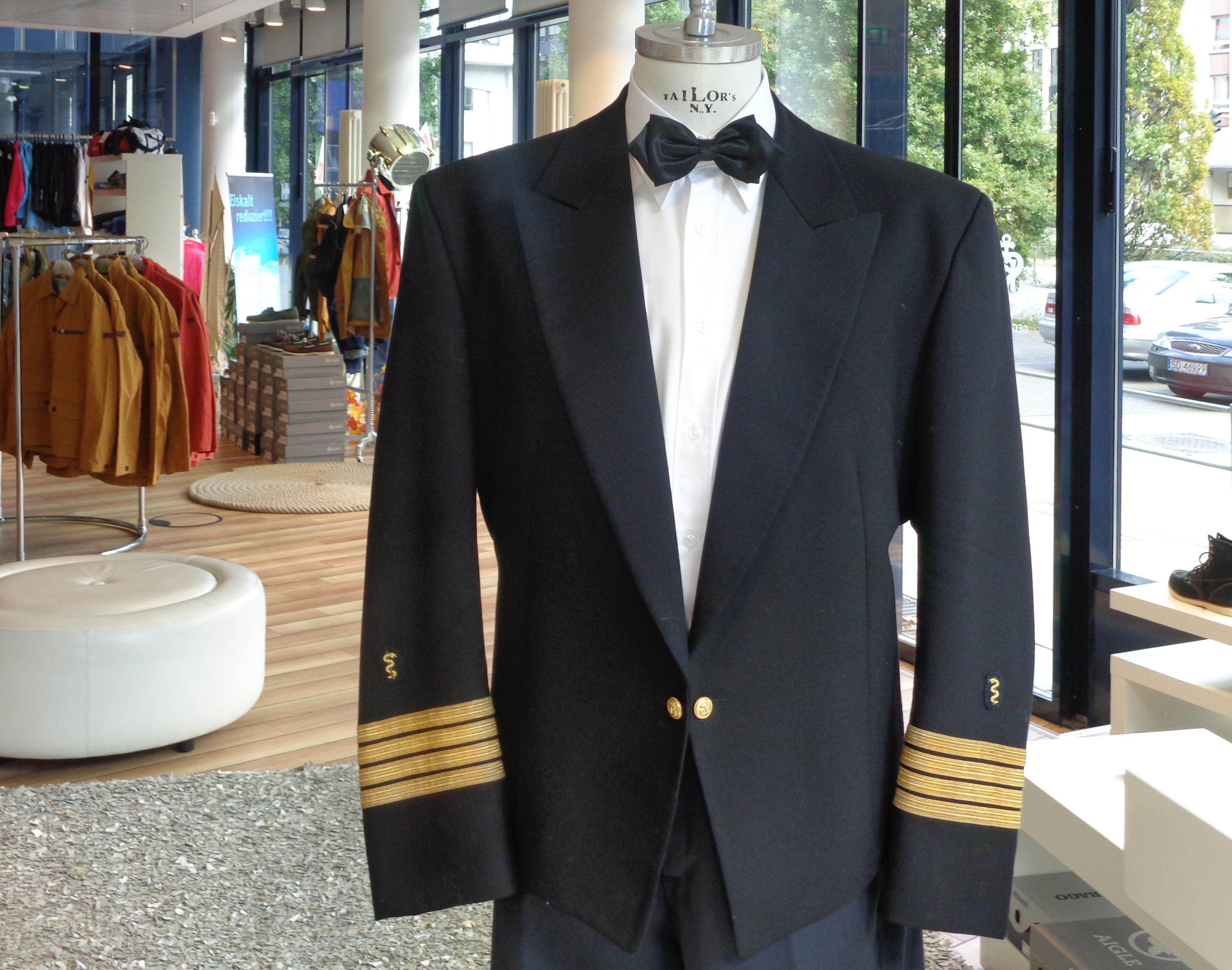 Uniformspenzer der Deutschen Marine (Flottenarzt)